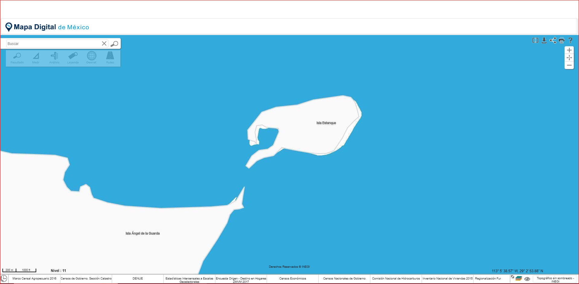 representación cartográfica de la Isla Estanque